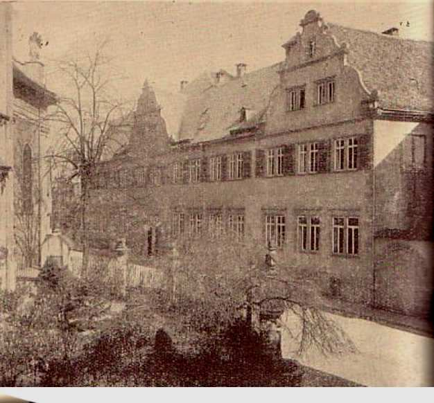 Deutsches Haus, erbaut 1589 von Hartmut von Kronberg (Vizedom von 1578-1598) 1944 zerstört